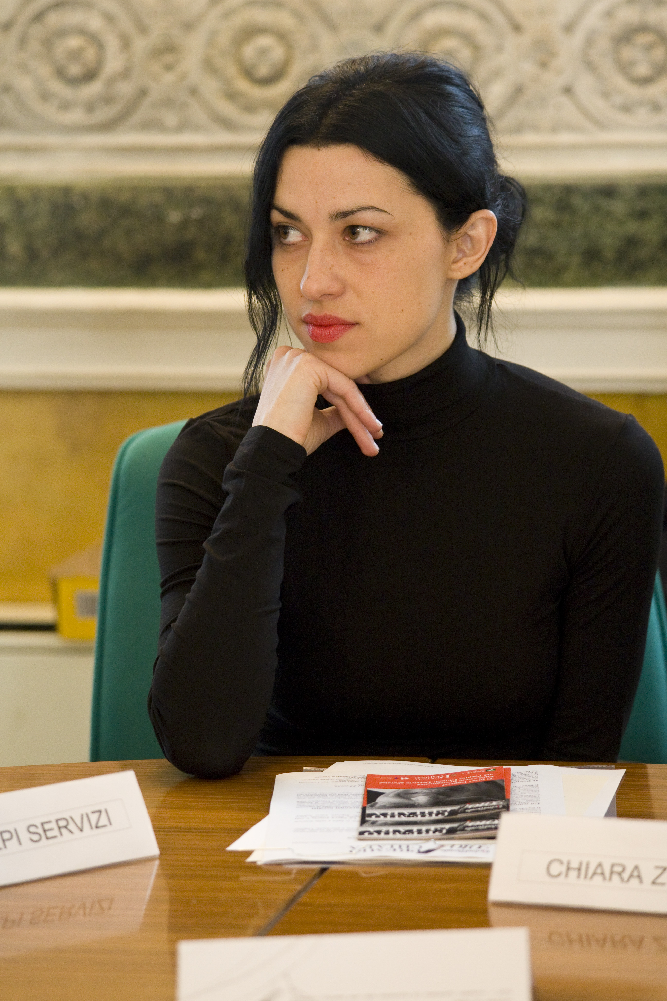 Chiara Zocchi